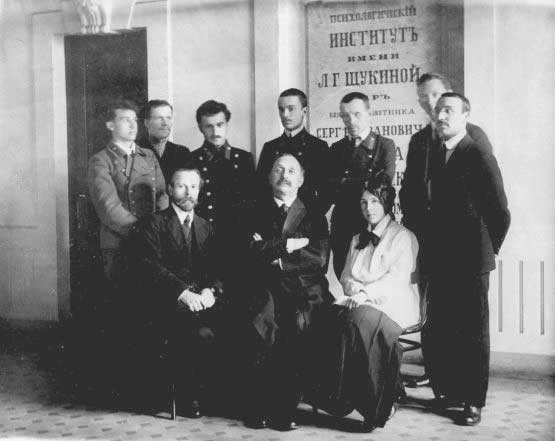 Г.И.Челпанов среди членов Психологического института. Слева – К.Н.Корнилов, справа – Н.Н.Ладыгигна-Котц, во втором ряду, четвертый слева – А.А.Смирнов, шестой – С.В.Кравков, седьмой – А.Ф.Лосев. 1914 г.